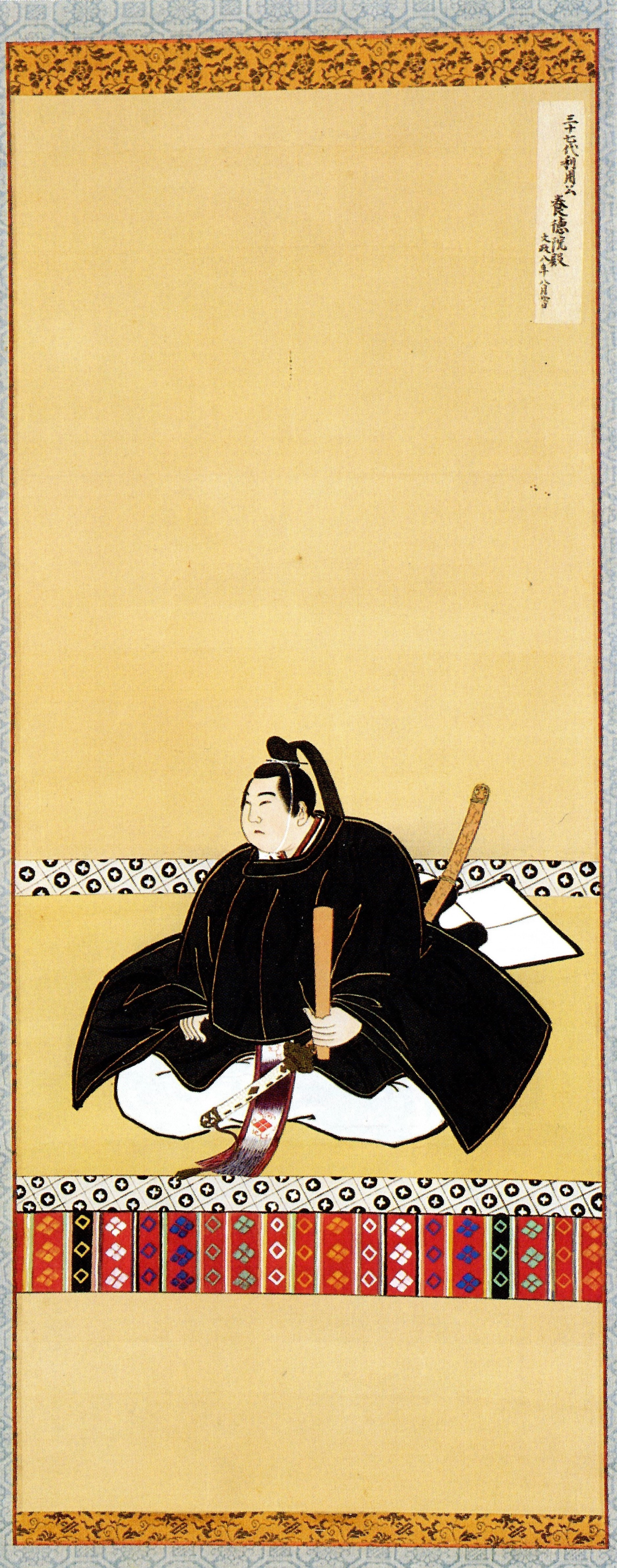 南部利用の肖像。